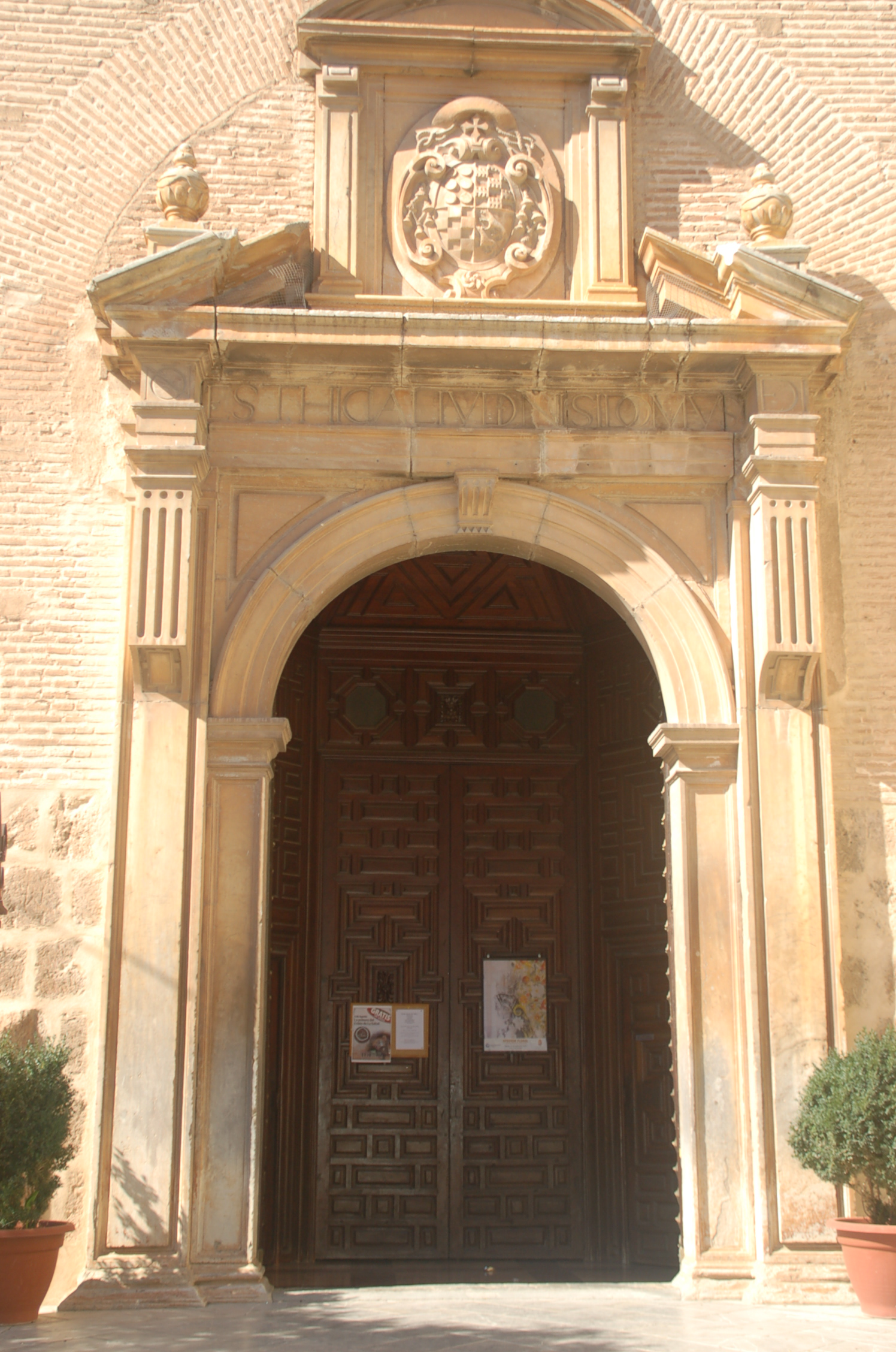 Iglesia que pertenece a la arquitectura mudéjar granadina. Construida a finales del siglo XVI. Es una de las últimas Iglesias en conservar con todos los valores artísticos de la tradición mudéjar.